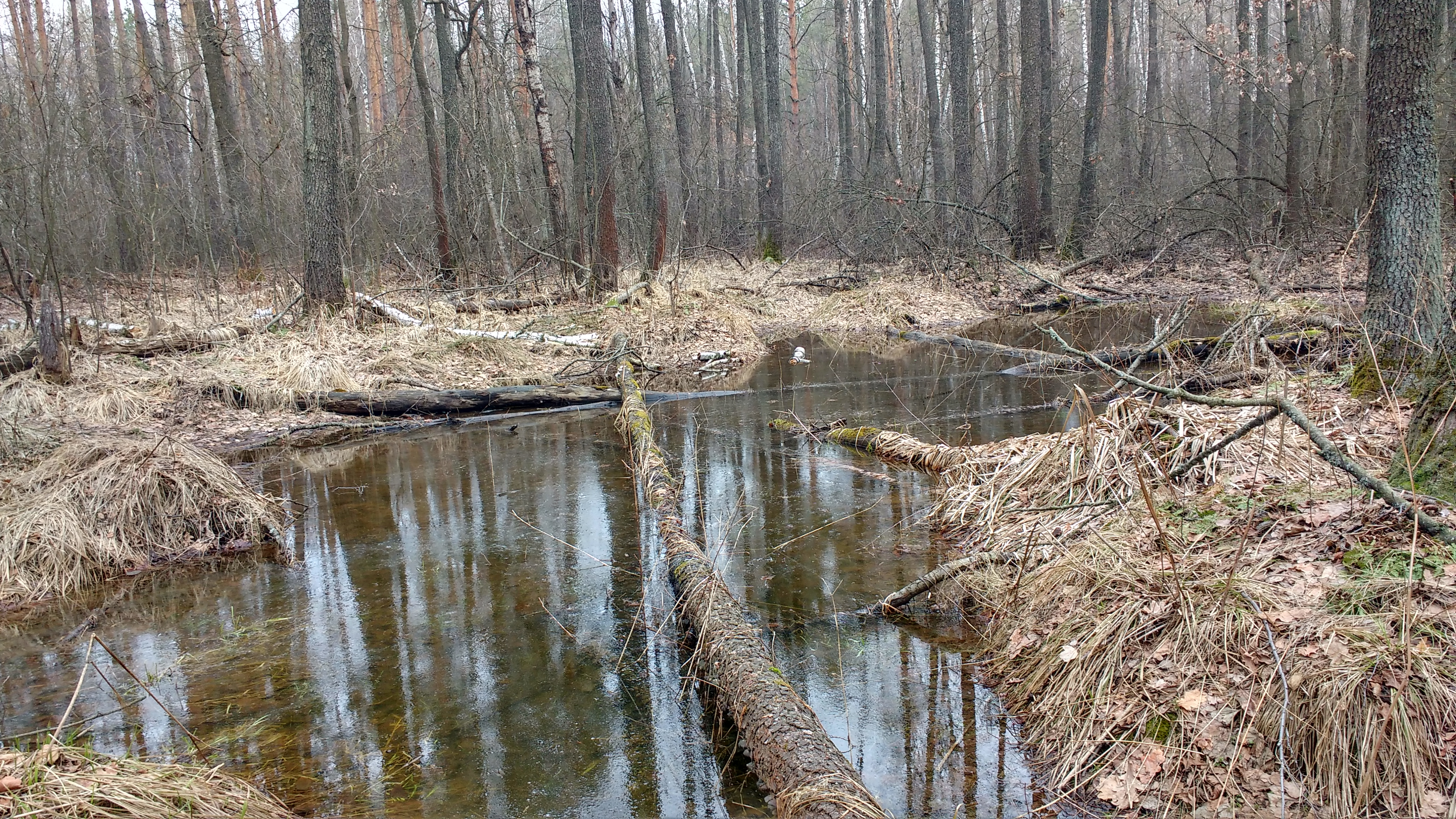 Річка Здвижв межах урочища "Пужа"